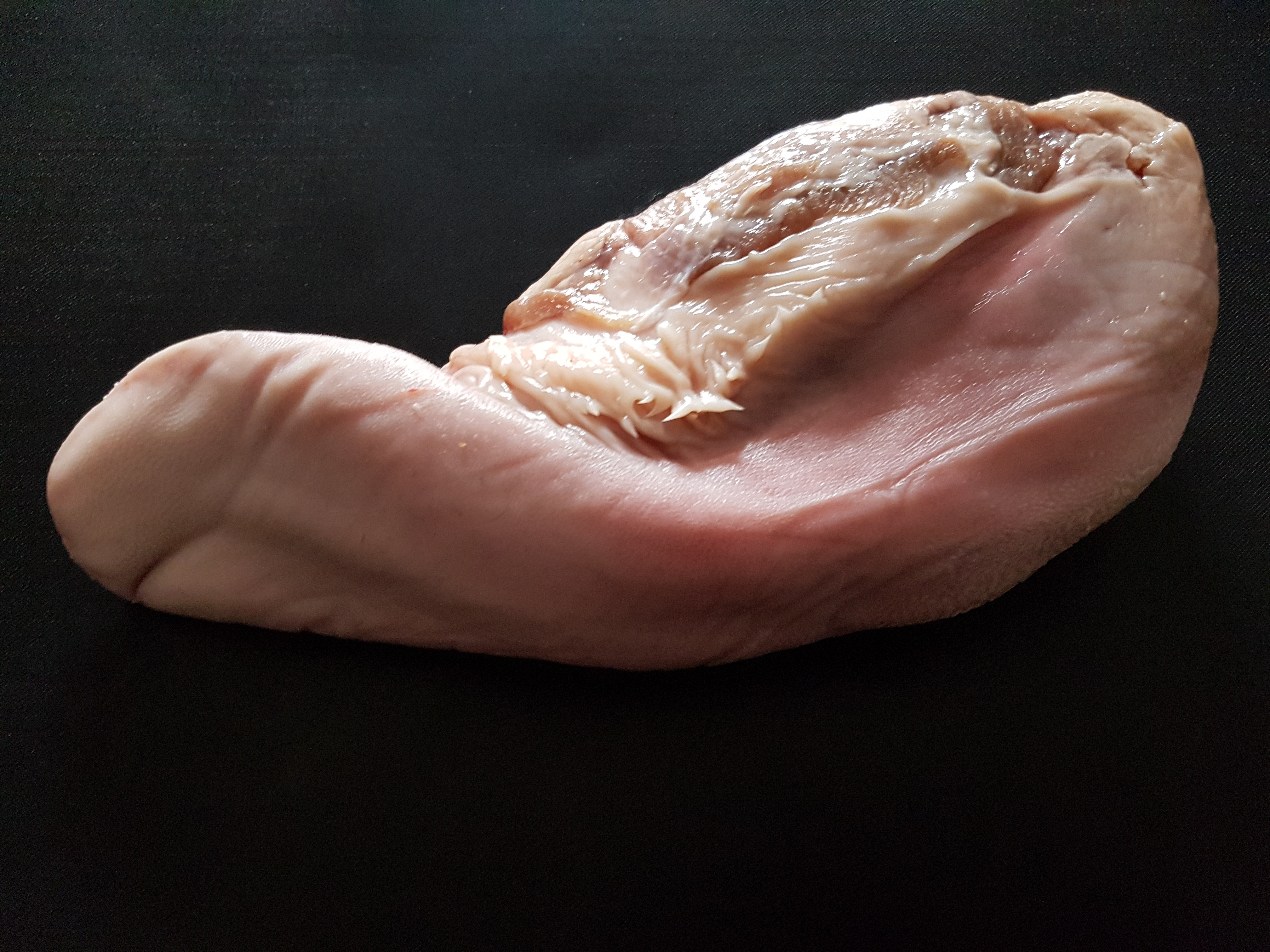 Kalbszunge ganz